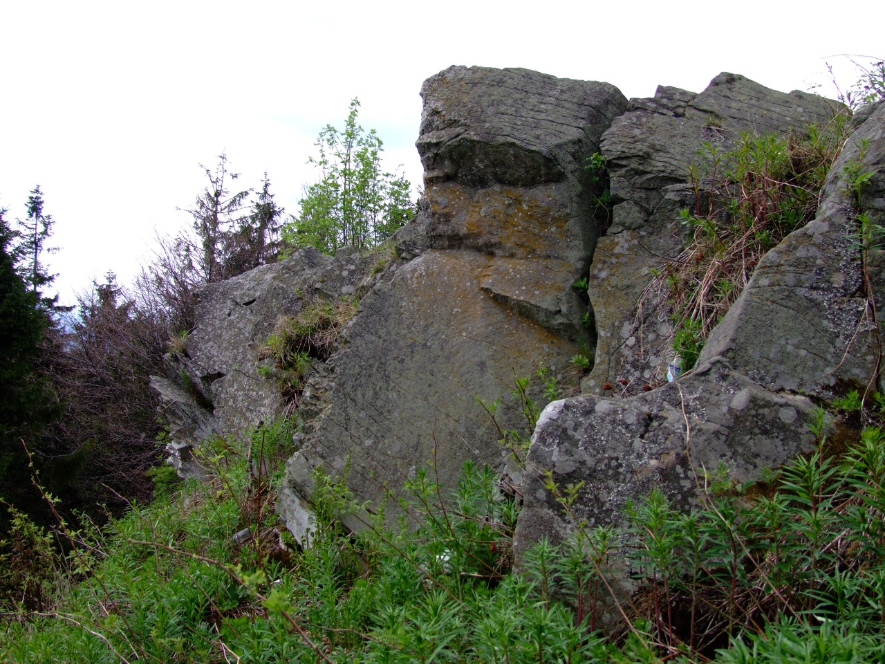 Skały Samorody na Lubaniu w Gorcach